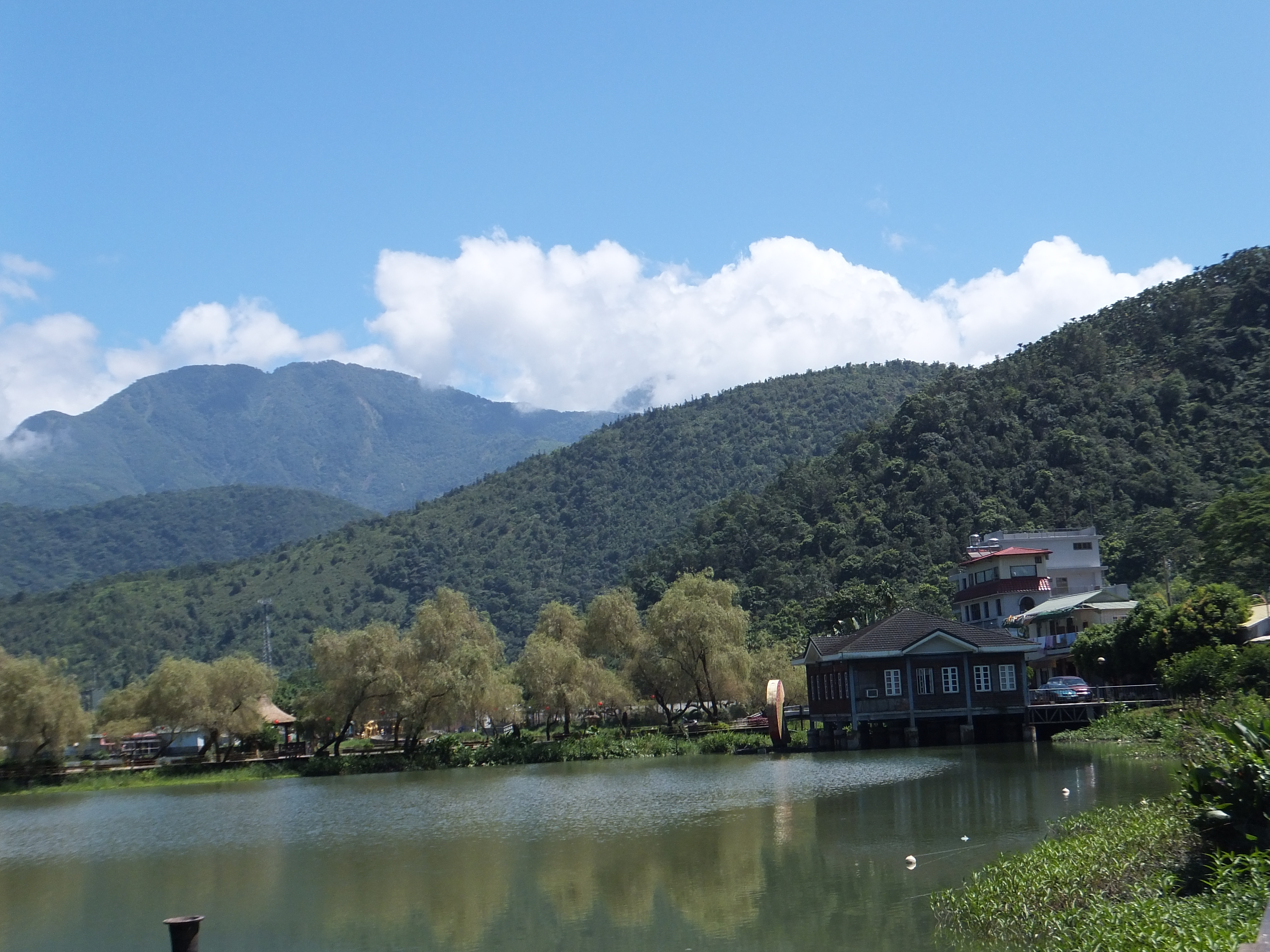 中文（台灣）: 埔里鯉魚潭